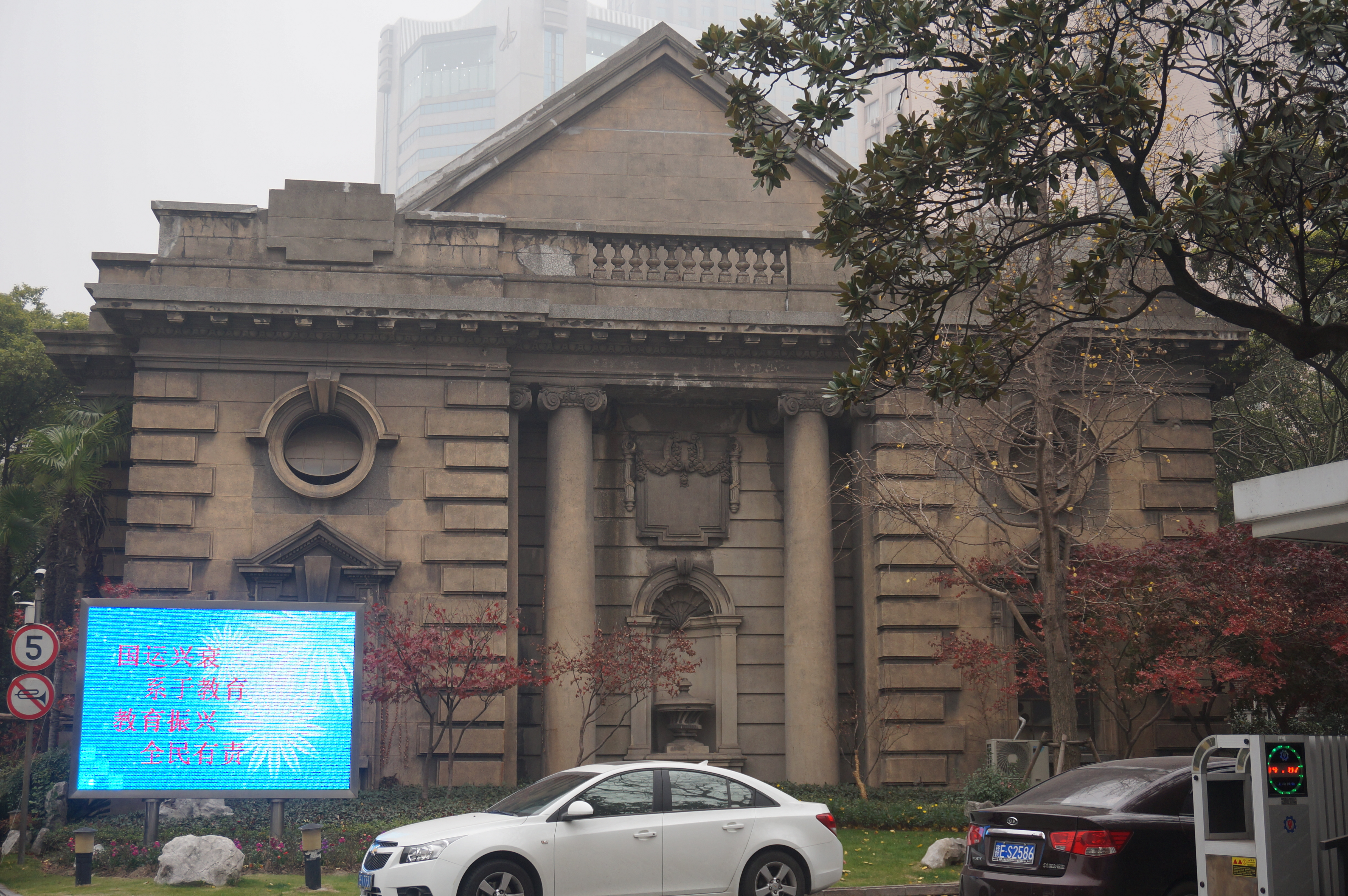 上海拉结会堂